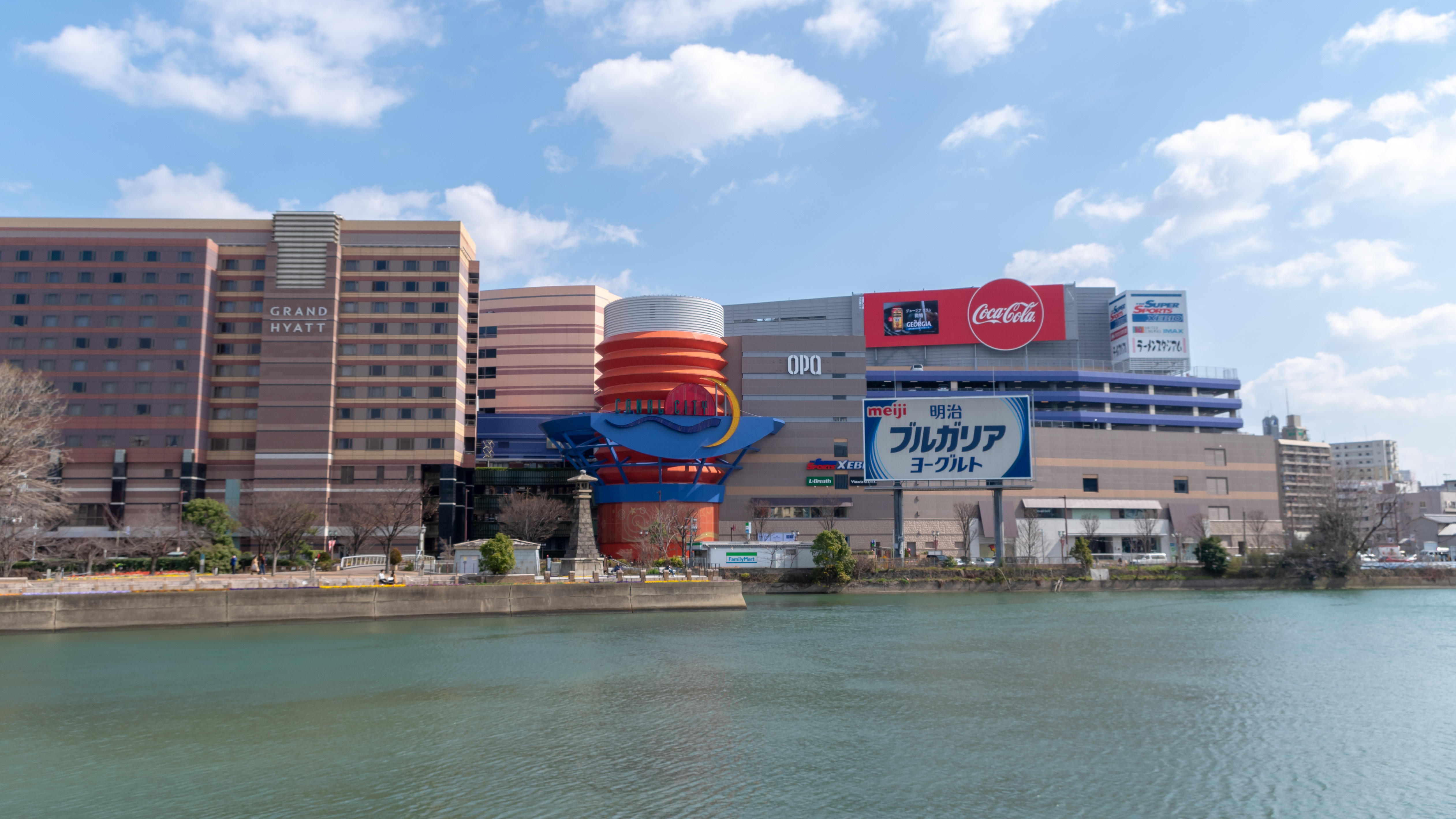 外観リニューアル後のキャナルシティ博多になります。